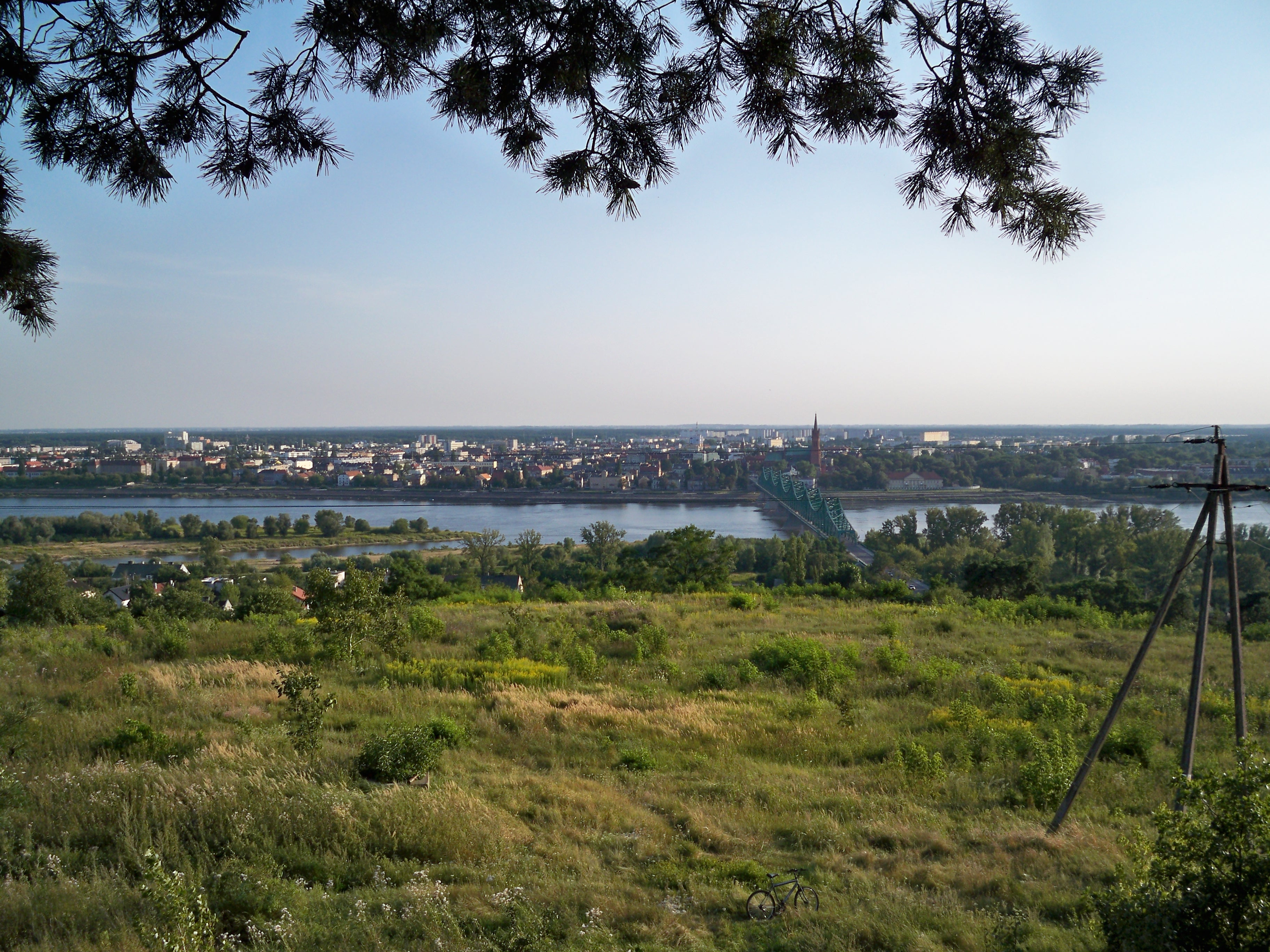 Widok ze Wzgórz Szpetalskich (2009 r.)